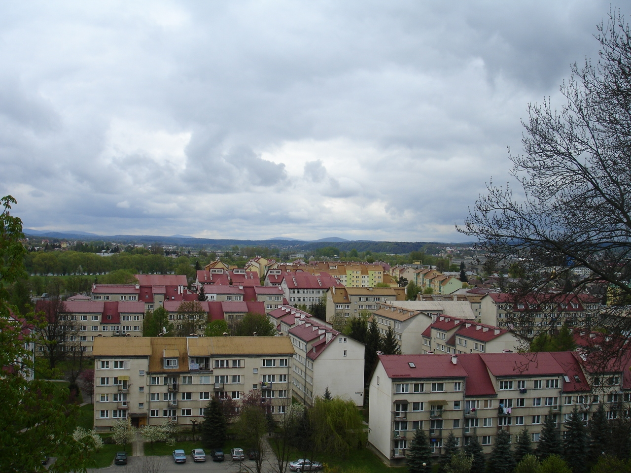 Błonie - subdistrict